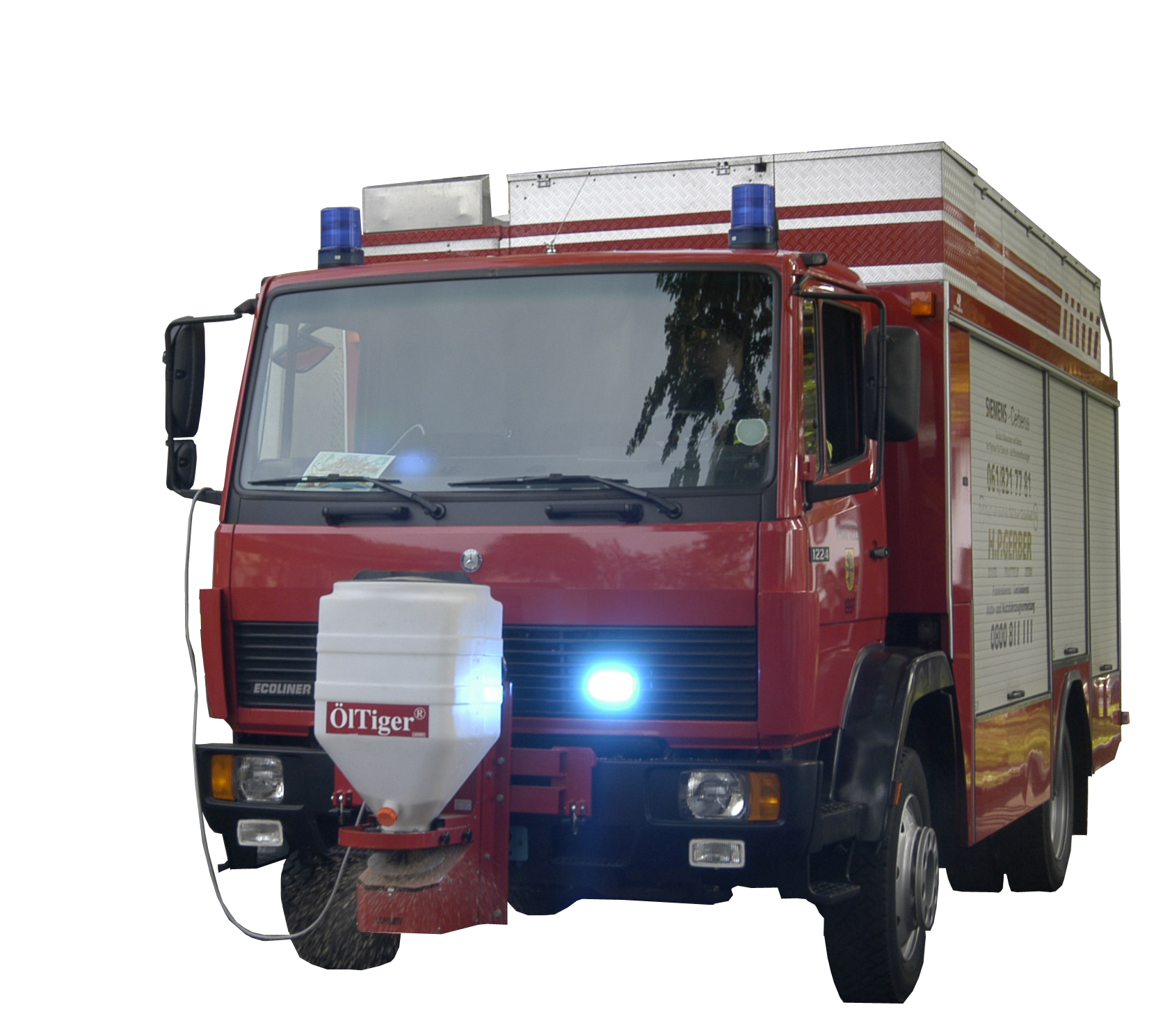 Pionierfahrzeug der Feuerwehr Pratteln